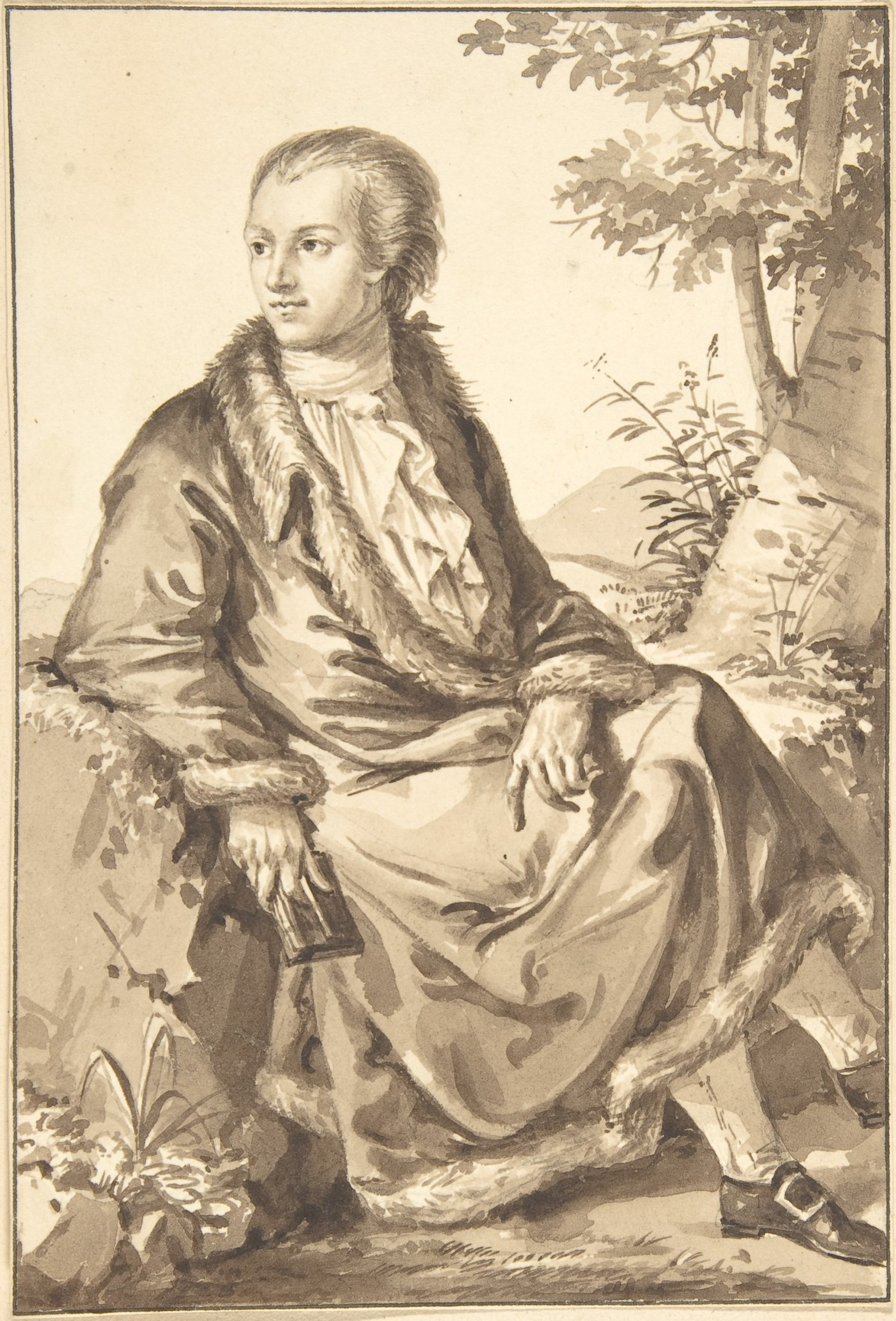 Drawing; Drawings